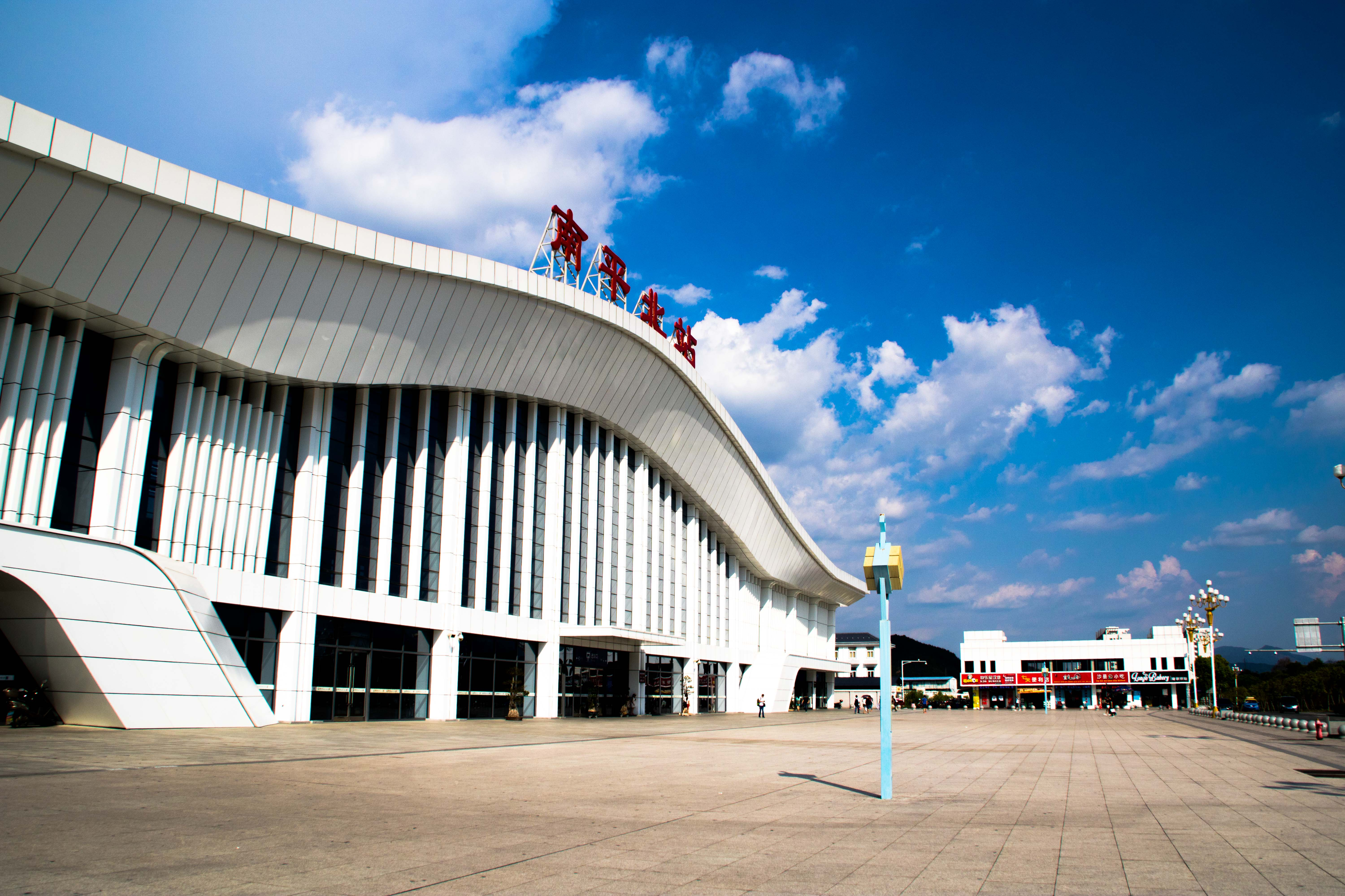 中文（中国大陆）: 南平北站站房